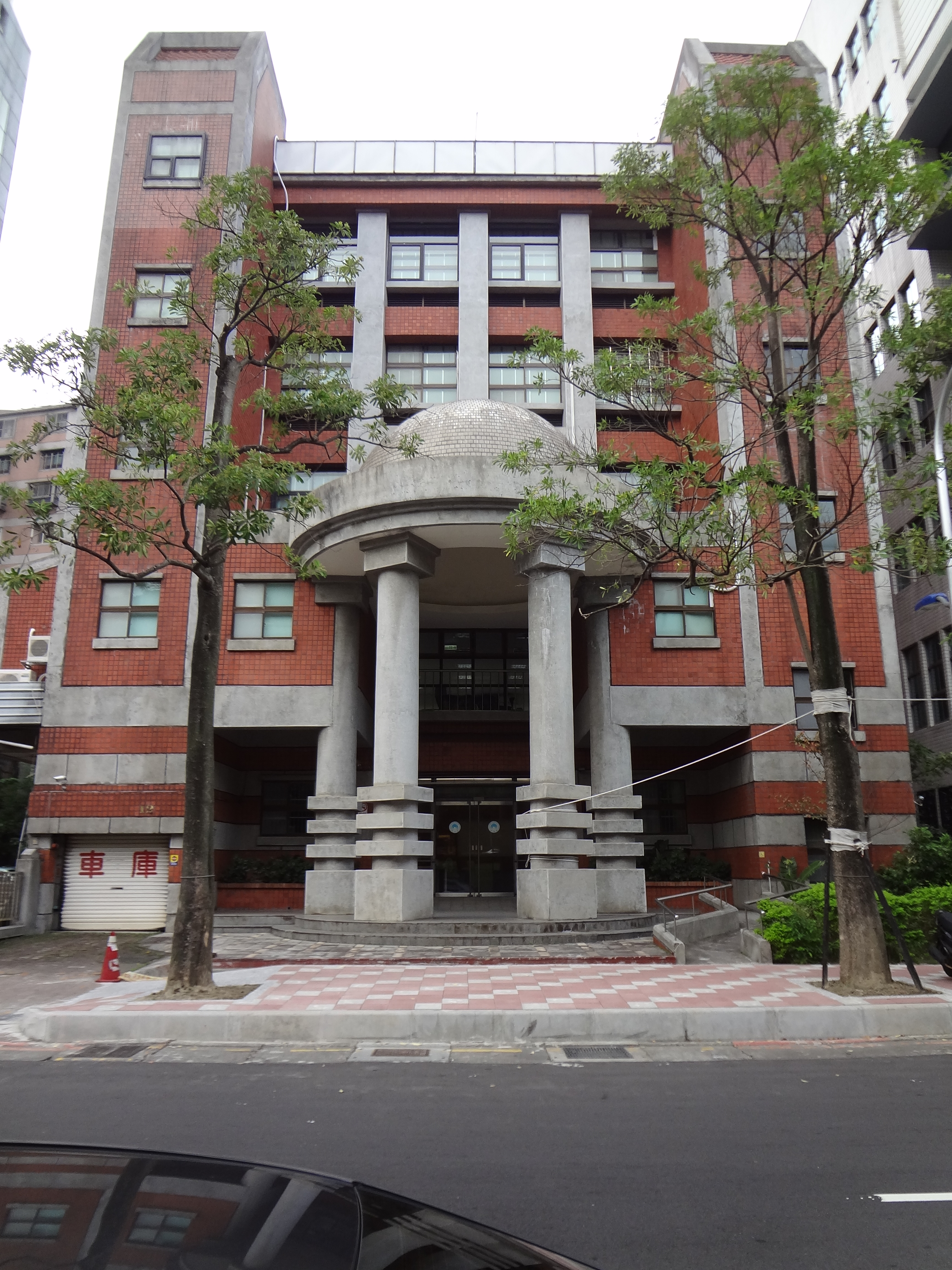 行政院基河大樓，位於臺北市士林區基河路12號，2014年9月2日改為內政部基河檔案大樓。